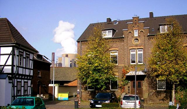 alte Schule (rechts), alte Schmiede (links)